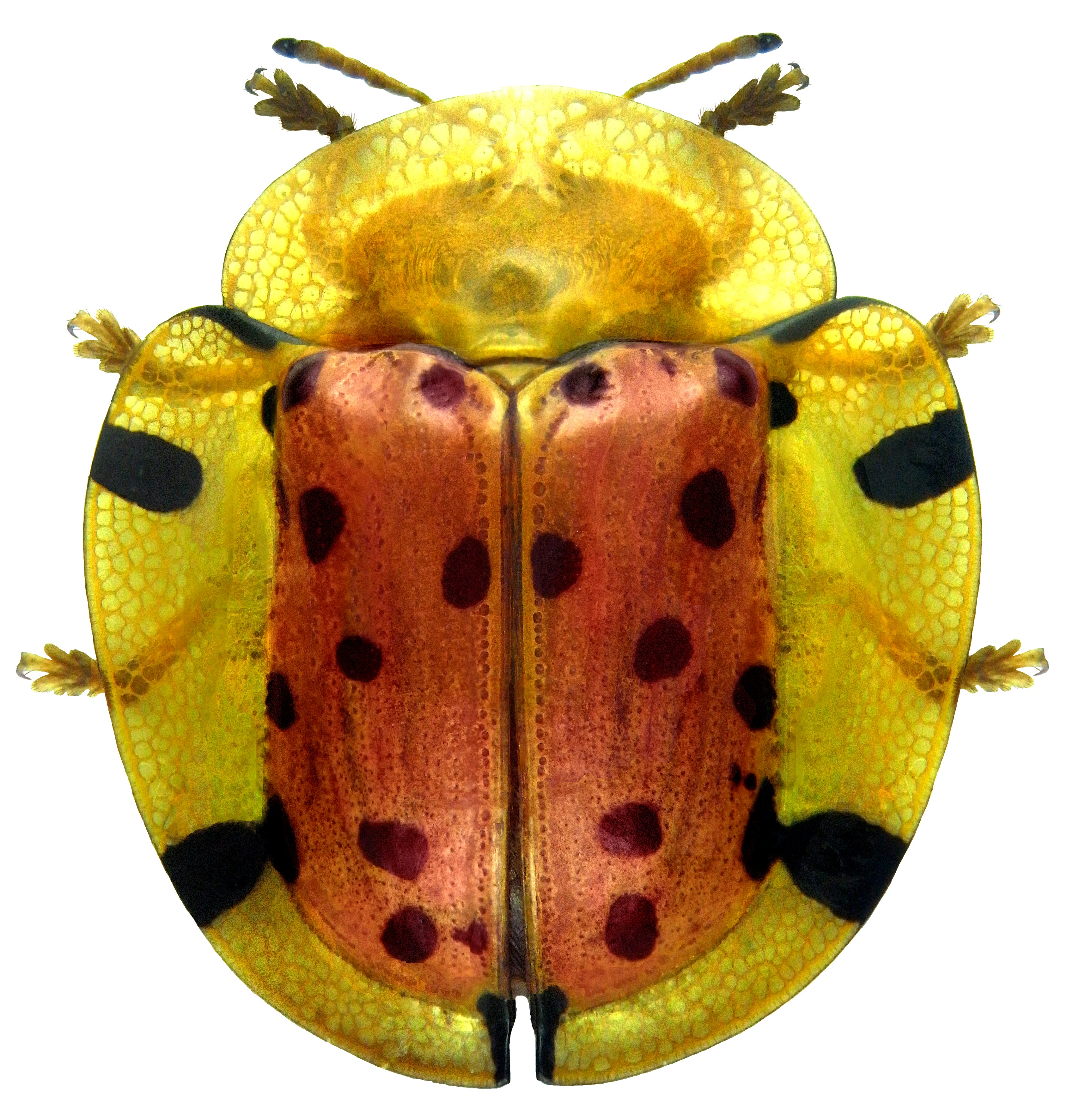 Aspidomorpha miliaris (Fabricius, 1775) Familie: Chrysomelidae Groesse: 11,7 mm Fundort: Indien, Süd-Goa, Canacona, Raj Baga Beach leg.det. U.Schmidt, 2010 Photo: U.Schmidt, 2011